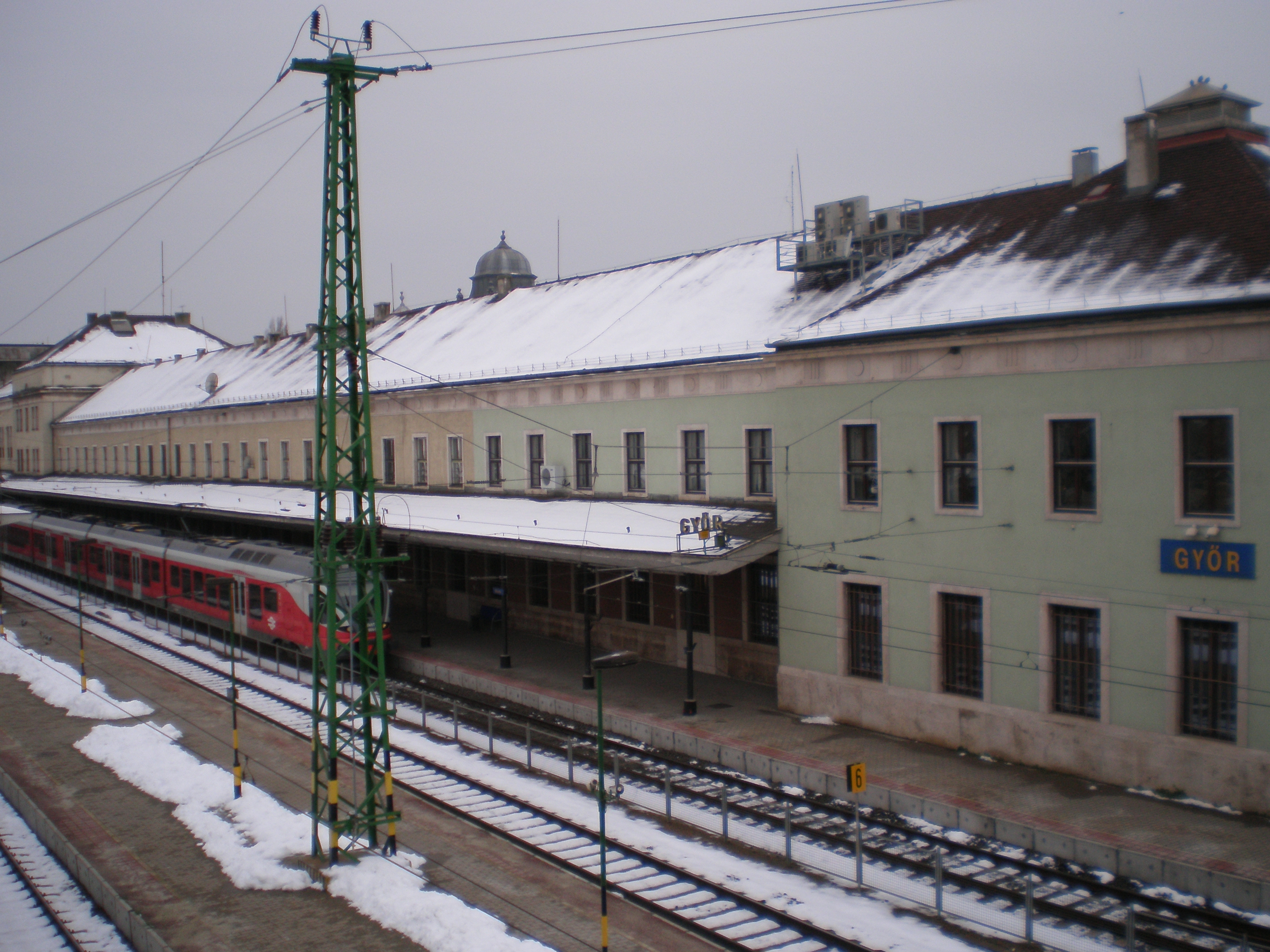 Győr, a pályaudvar a Baross hídról nézve